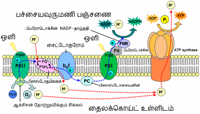 தைலக்கொய்ட் மென்சவ்வில் நடைபெறும் ஒளித்தொகுப்பின் ஒளித்தாக்கங்கள்